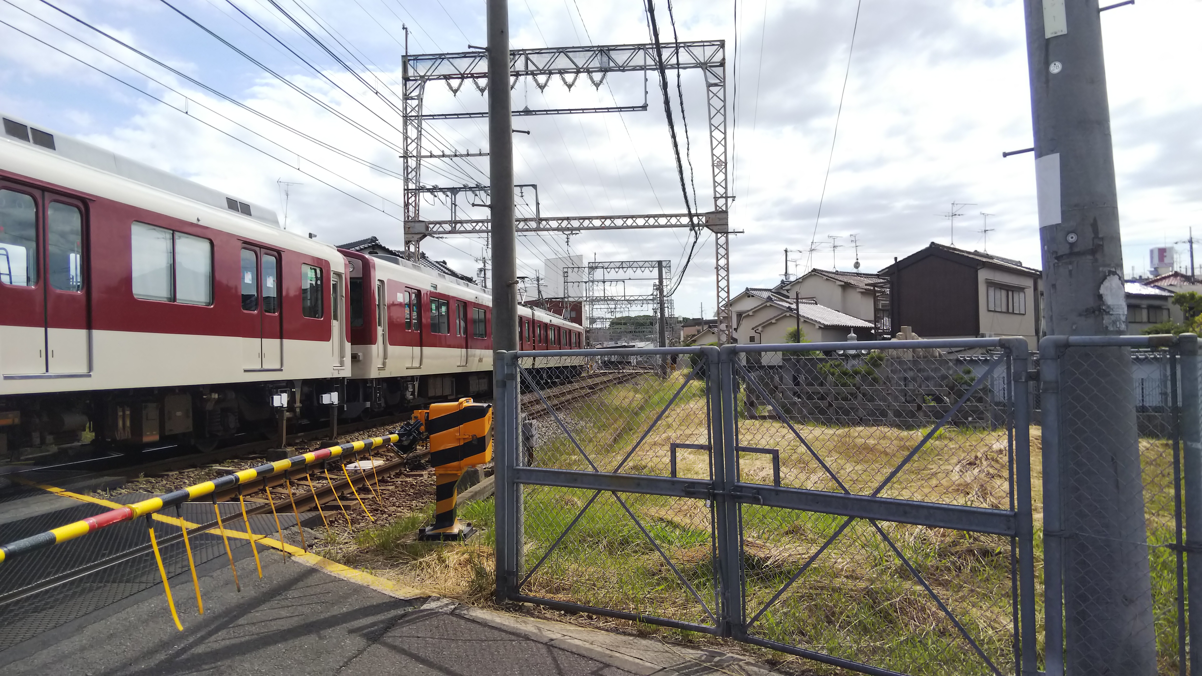 誉田八幡駅の跡地